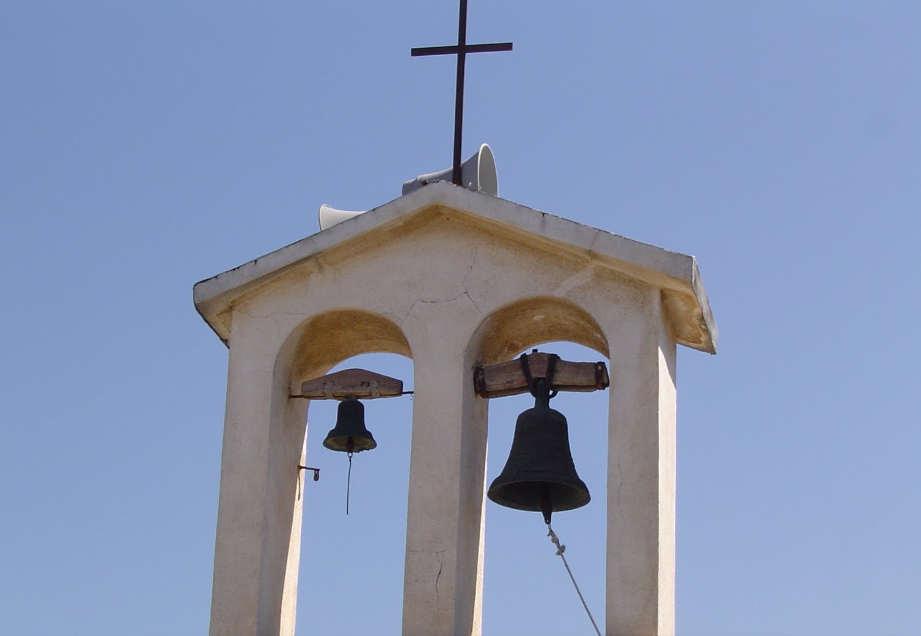 Vista del Campanile della Chiesa di Paterriti